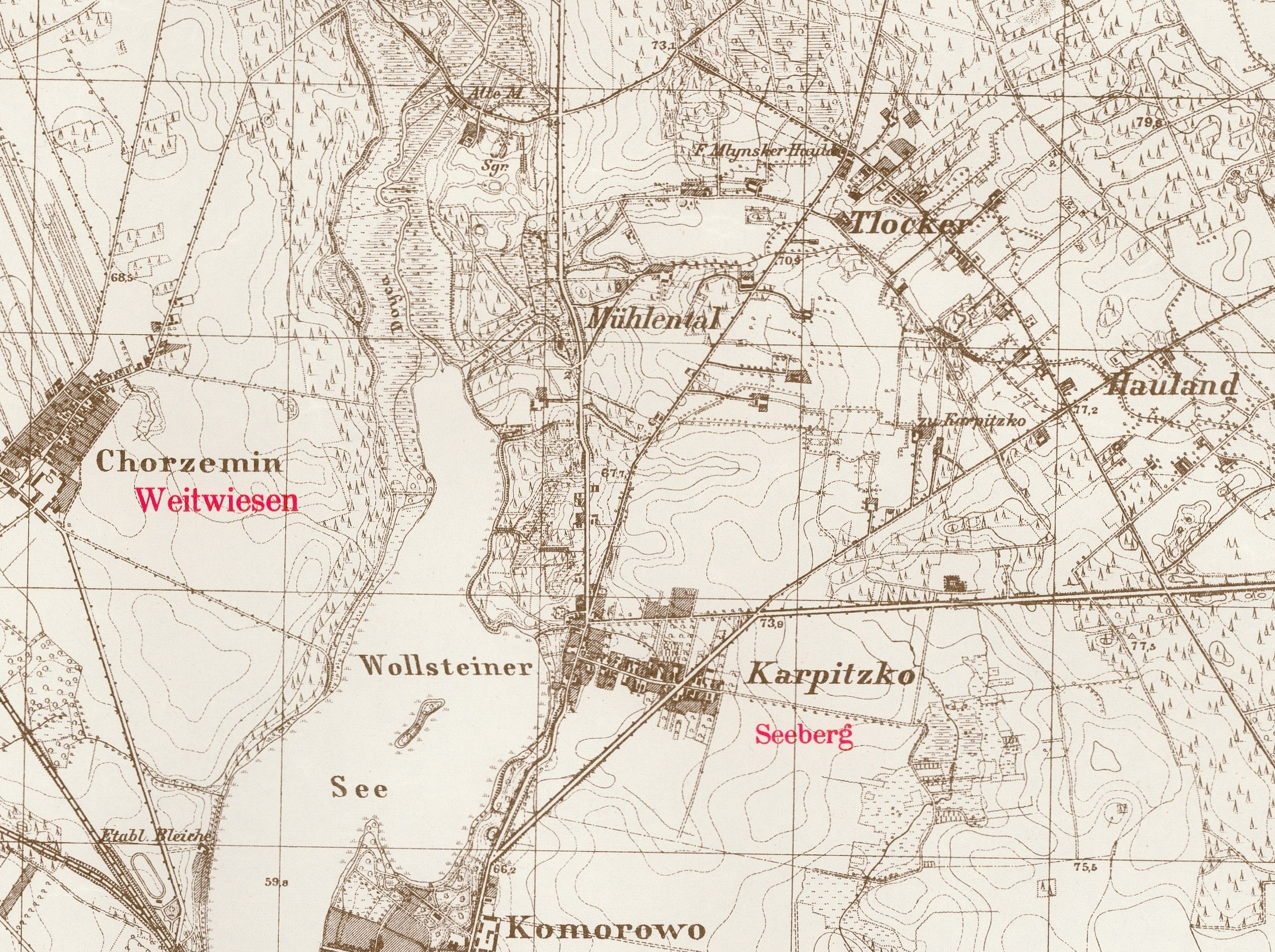 wg. mapy Preussicher Landeraufnahme 1893, z naniesionymi poprawkami w roku 1940, Blatt Wollstein nr 3862, Skala 1:25 000